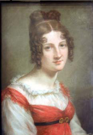 Amie de Constance Mayer, Élisa Voïart, née Anne-Élisabeth Petitpain (1786–1866), était l'épouse de Jacques-Philippe Voïart.